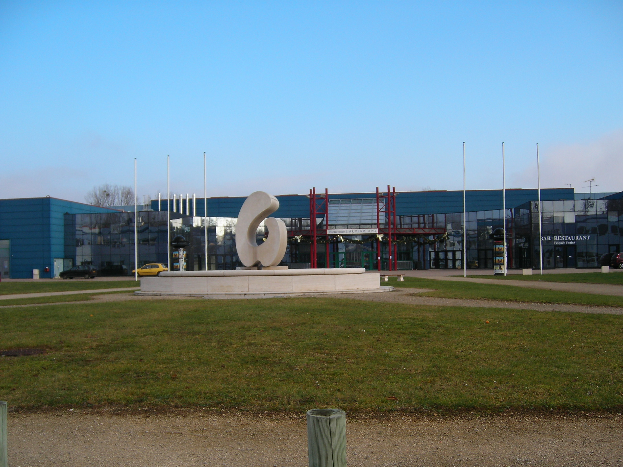 Parc des expositions d'Auxerre source: Spanish Gabacho